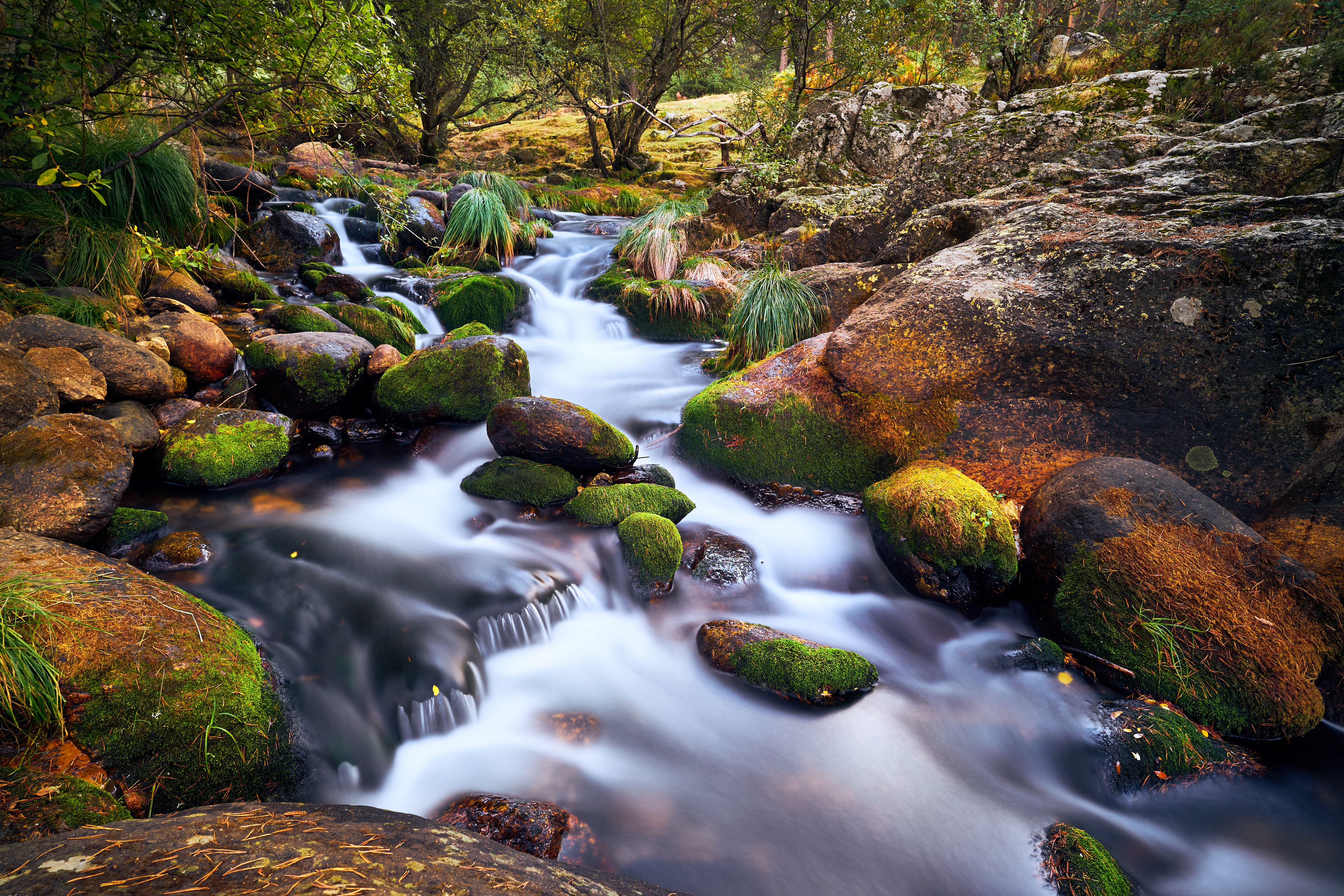 Rio Lozoya